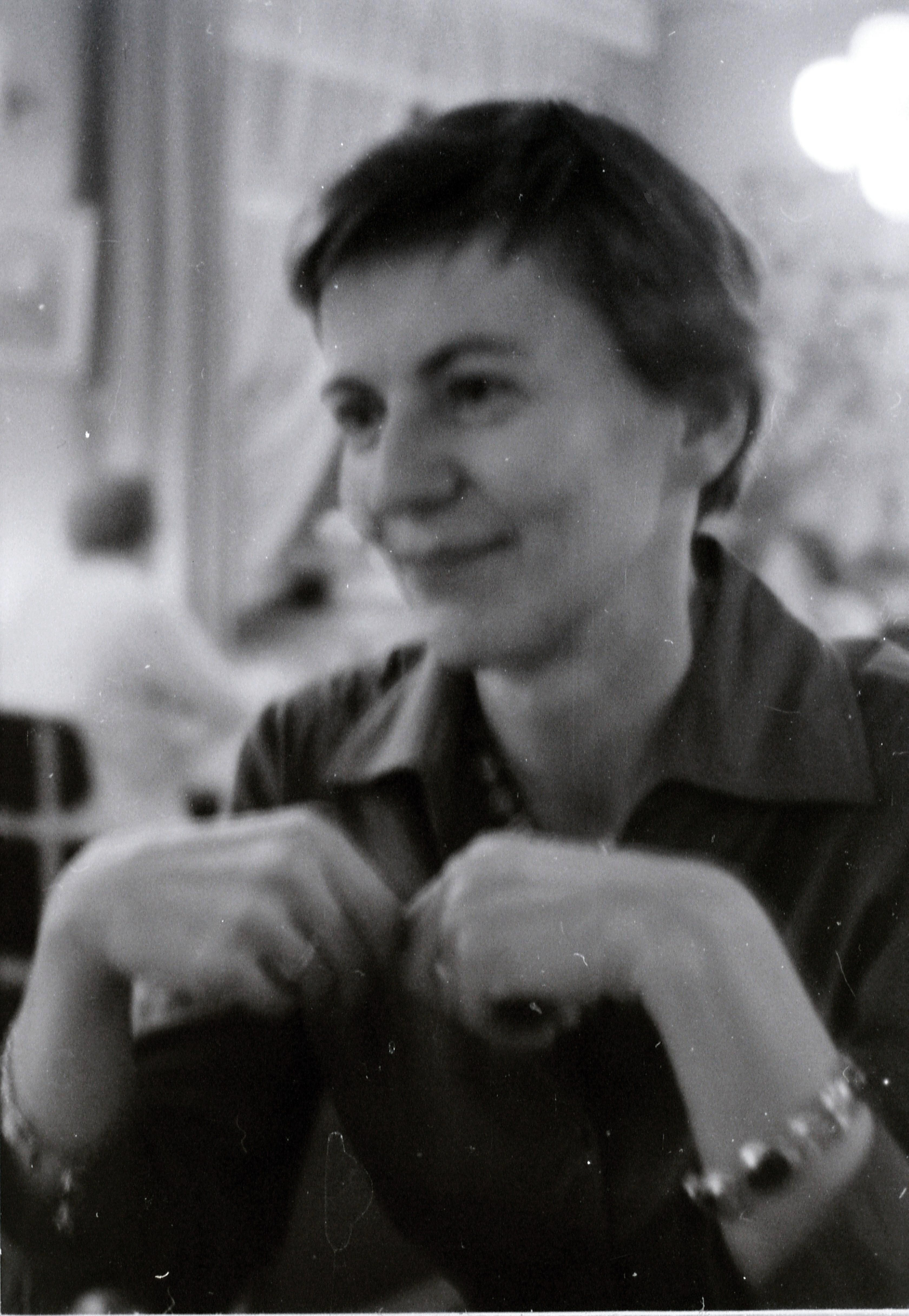 Anna-Britta Hellbom ; 1920-2005 ; etnograf